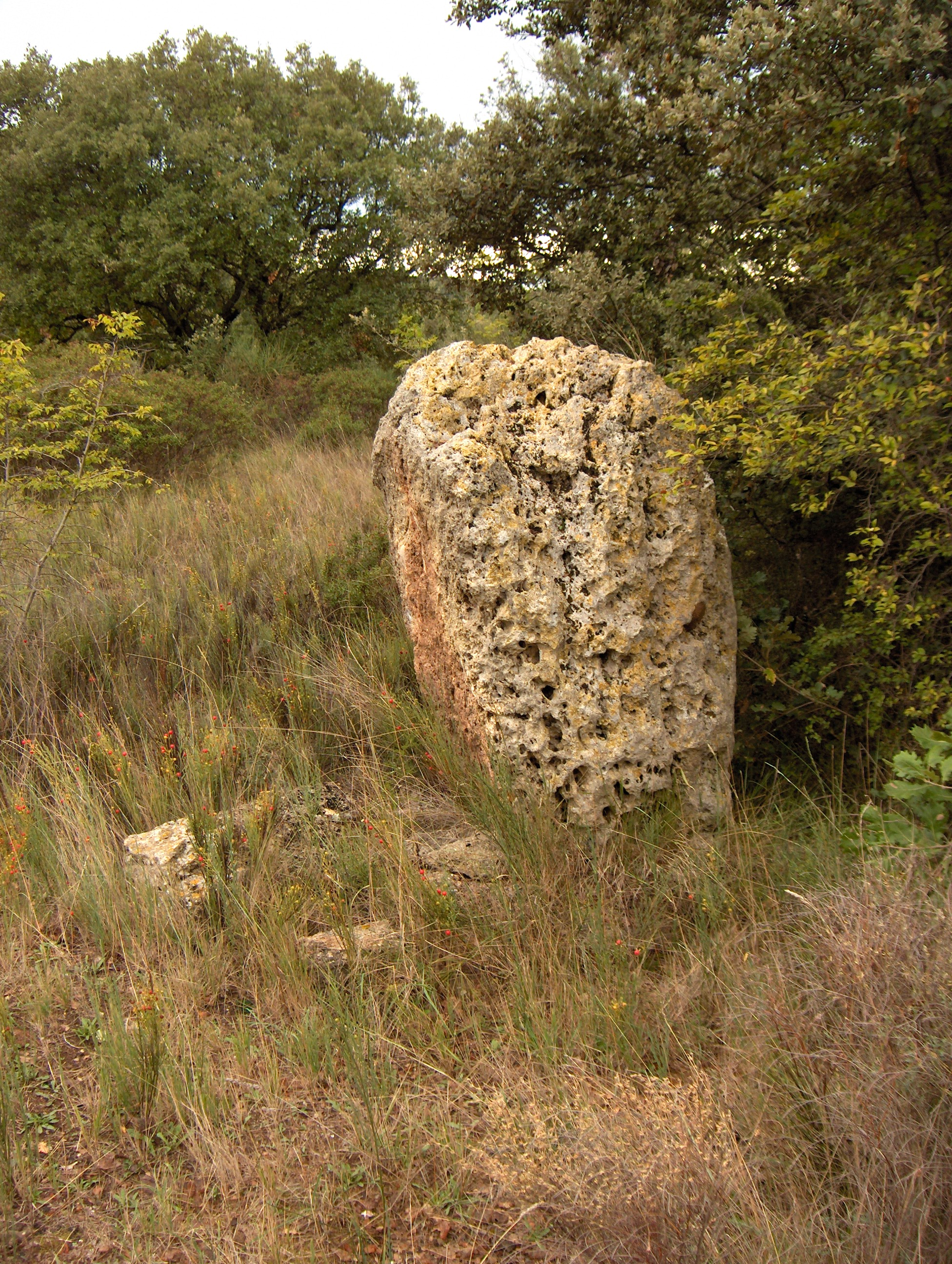 Menhir de Peyreficade, Caux (Hérault), 34720